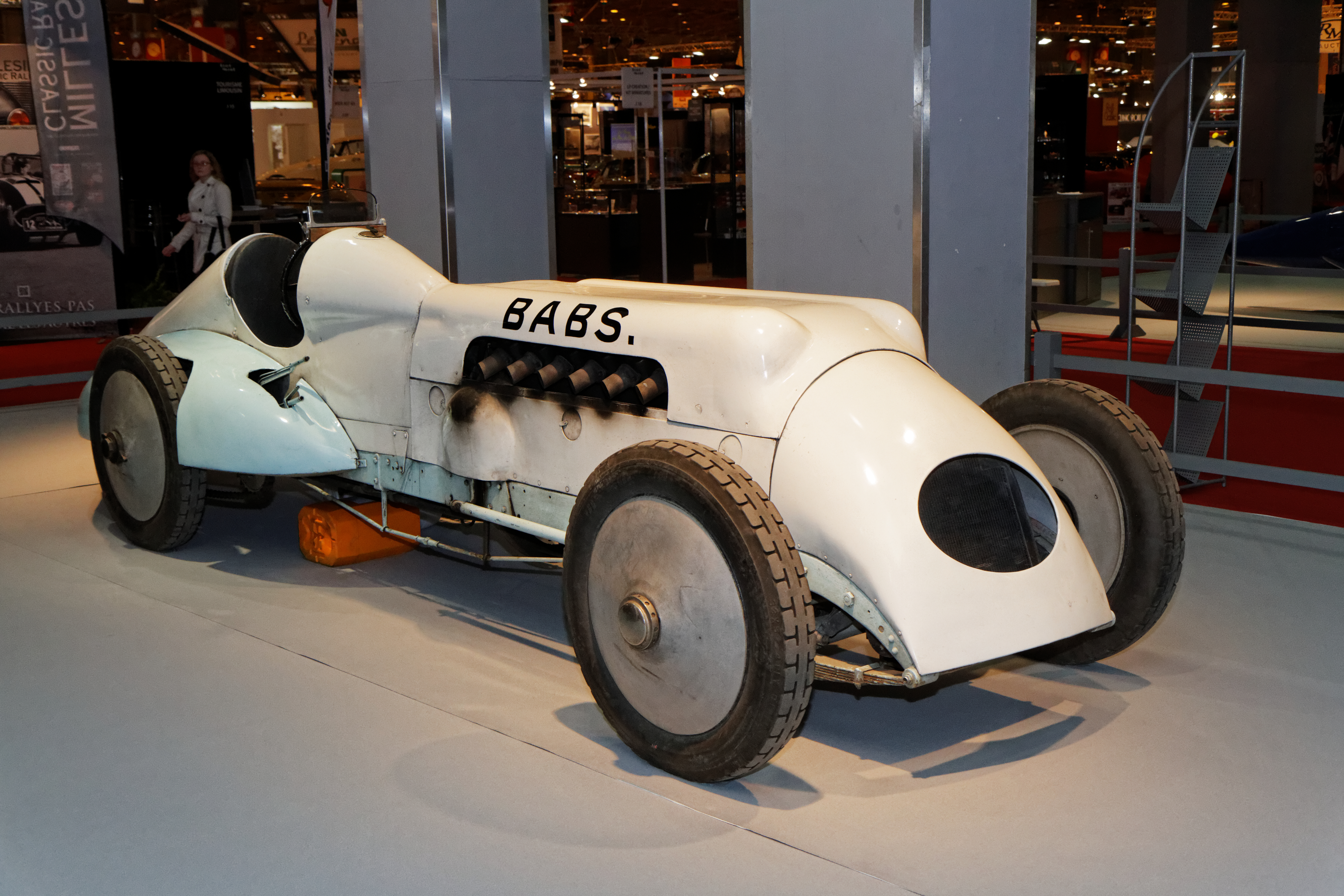 La BABS exposée lors du salon Retromobile 2014.